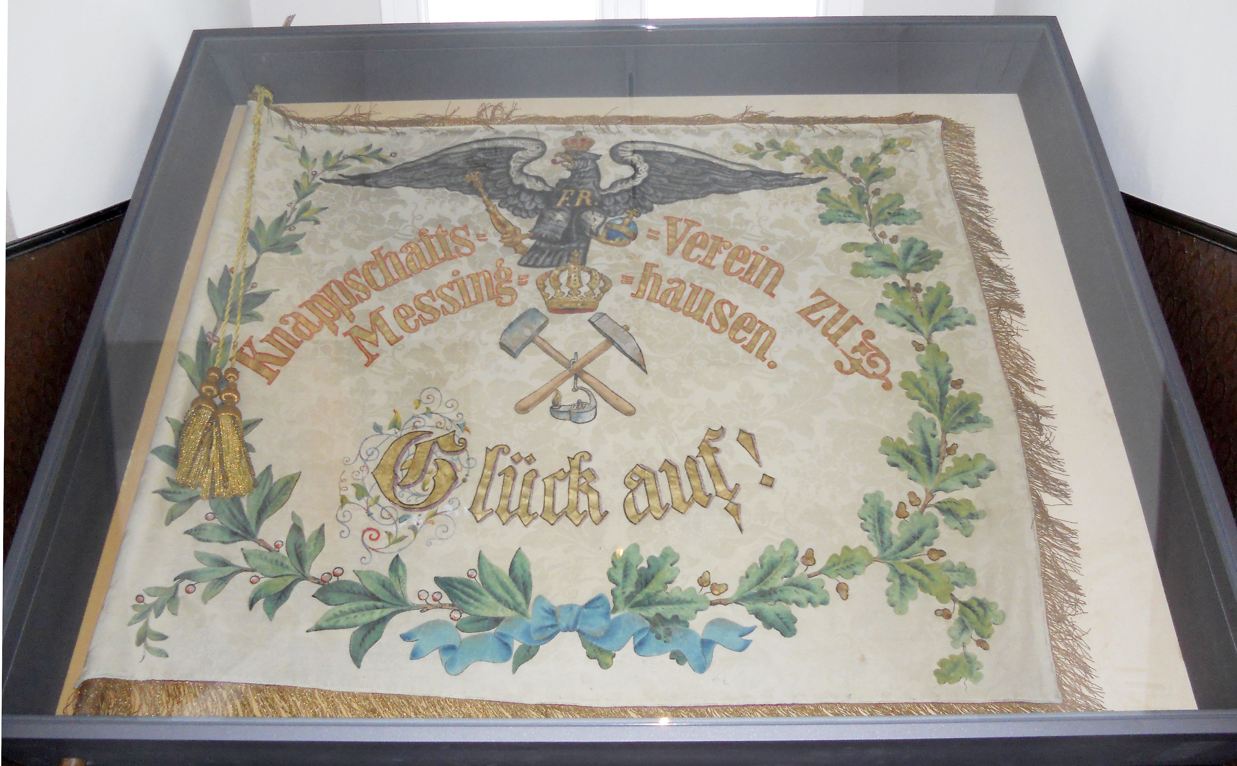 Alte Knappschaftsfahne Messinghausen, ausgestellt im Haus Hövener in Brilon